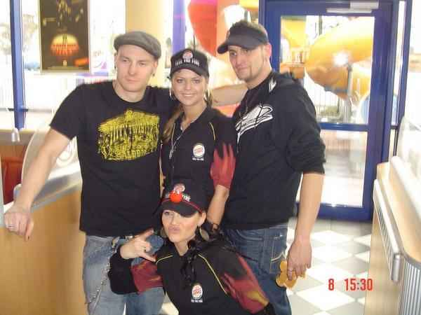 Nu Pagadi in Originalbesetzung